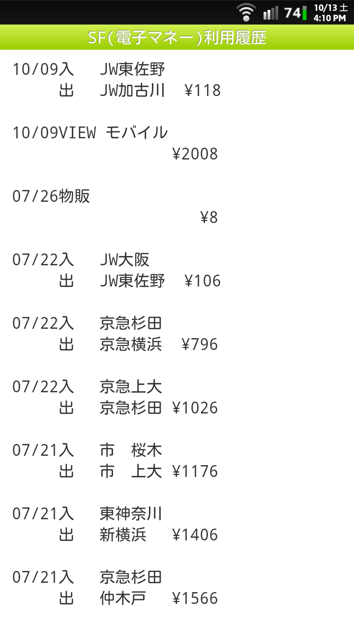 モバイルSuica利用履歴。 無印=JR東日本 JW=JR西日本 市=横浜市営地下鉄 京急=京浜急行電鉄